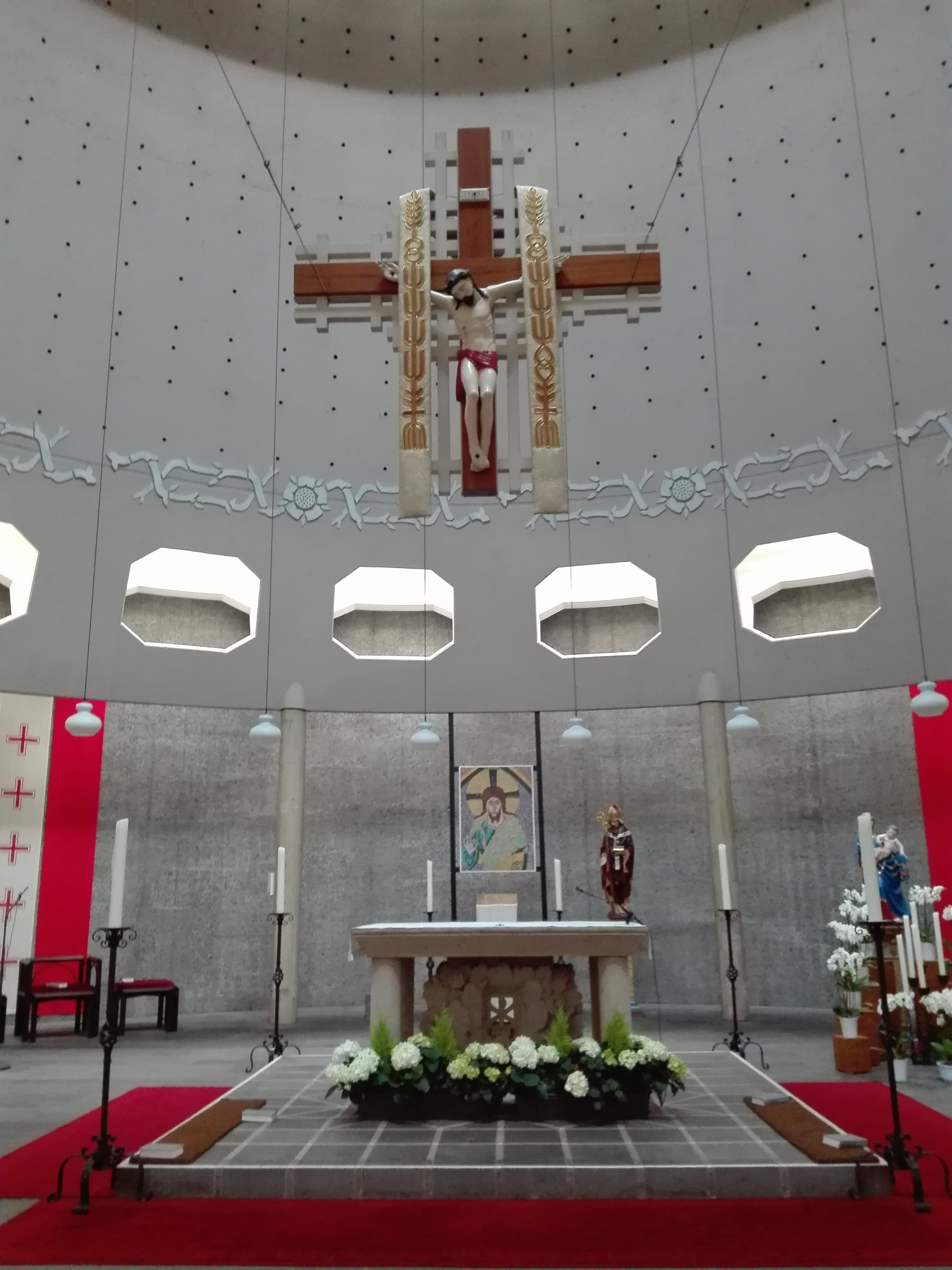 Innenansichten der katholischen Kirche Sankt Remigius in Wuppertal-Sonnborn